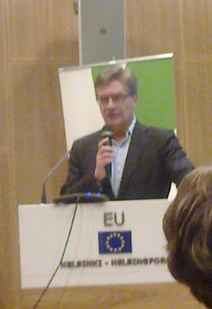 Pauli Järvenpää